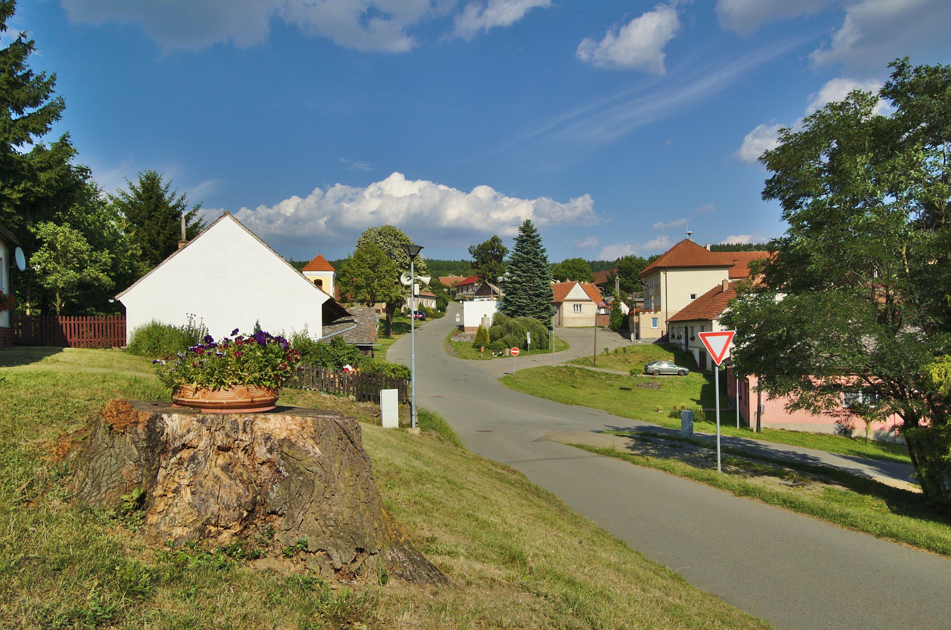 Náves, Velenov, okres Blansko